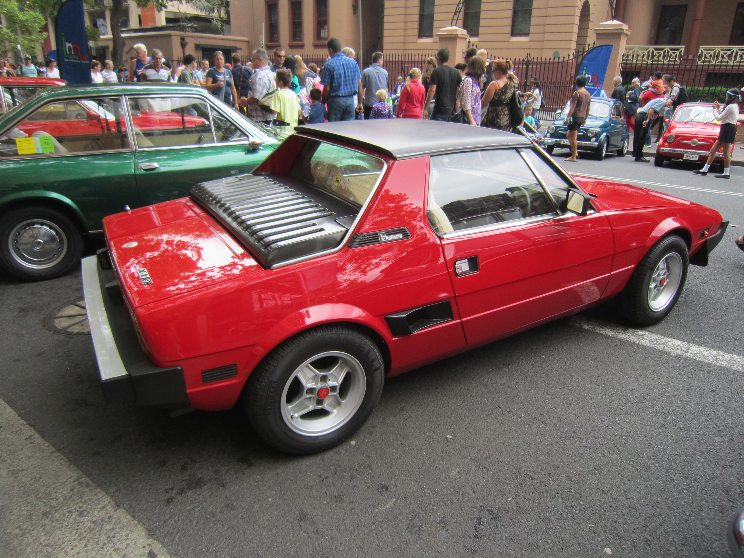 Fiat X1/9